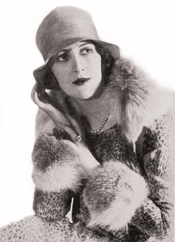 L'attrice italiana Elena Sangro. Foto del 1928